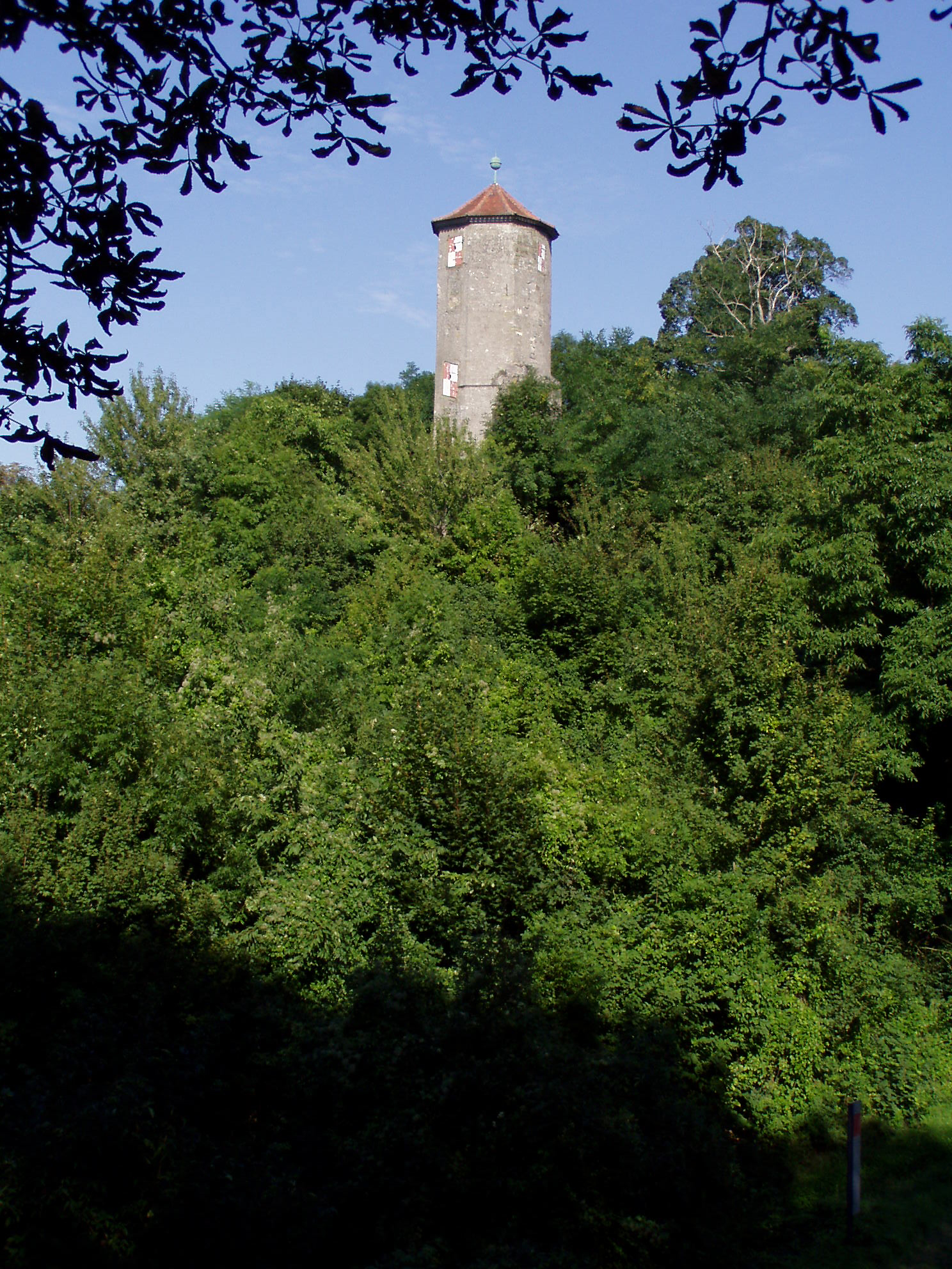 Der Treppenturm auf dem Schlossberg von Castell / Unterfranken